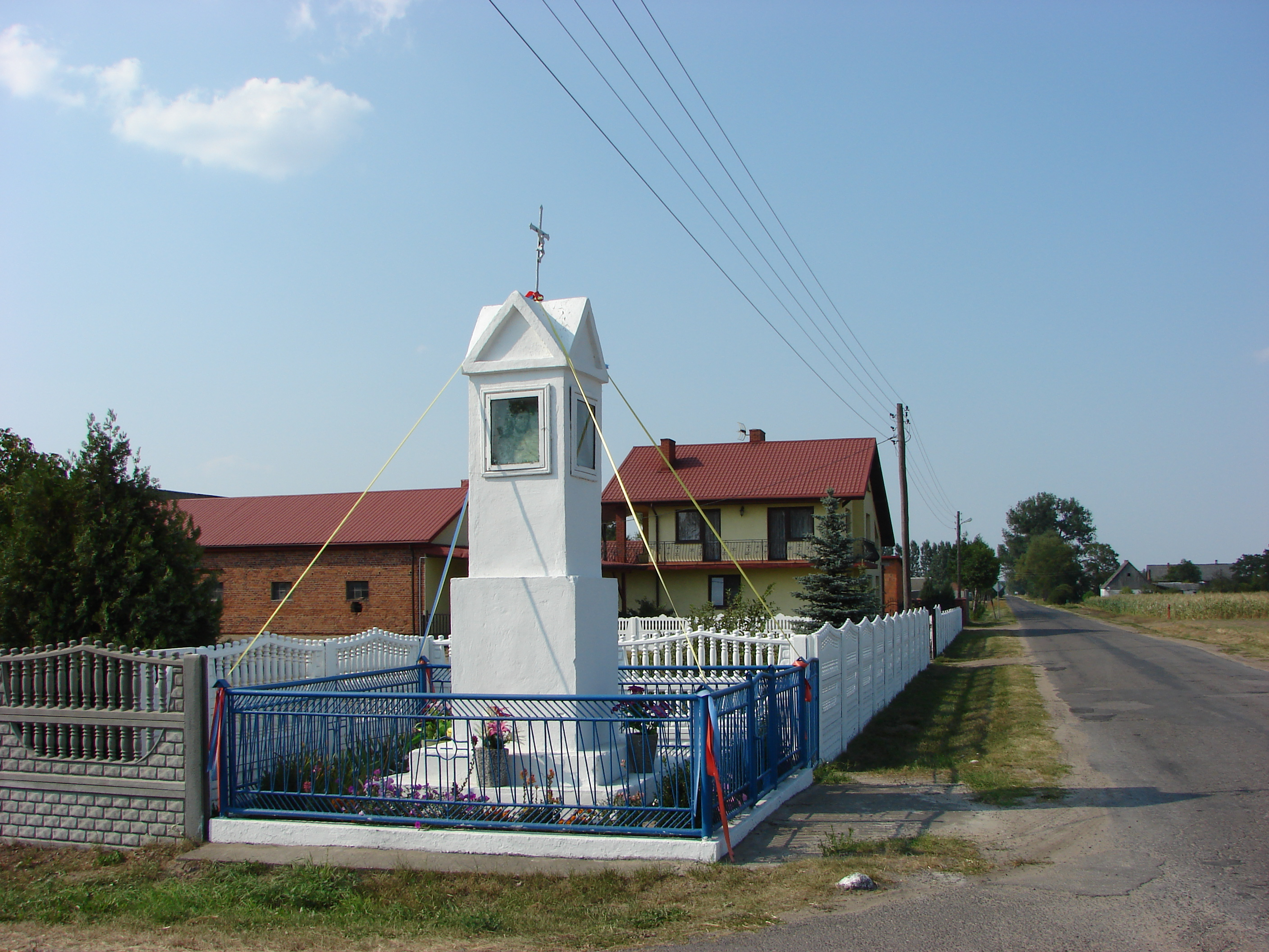 Bylice, wielkopolskie, kapliczka